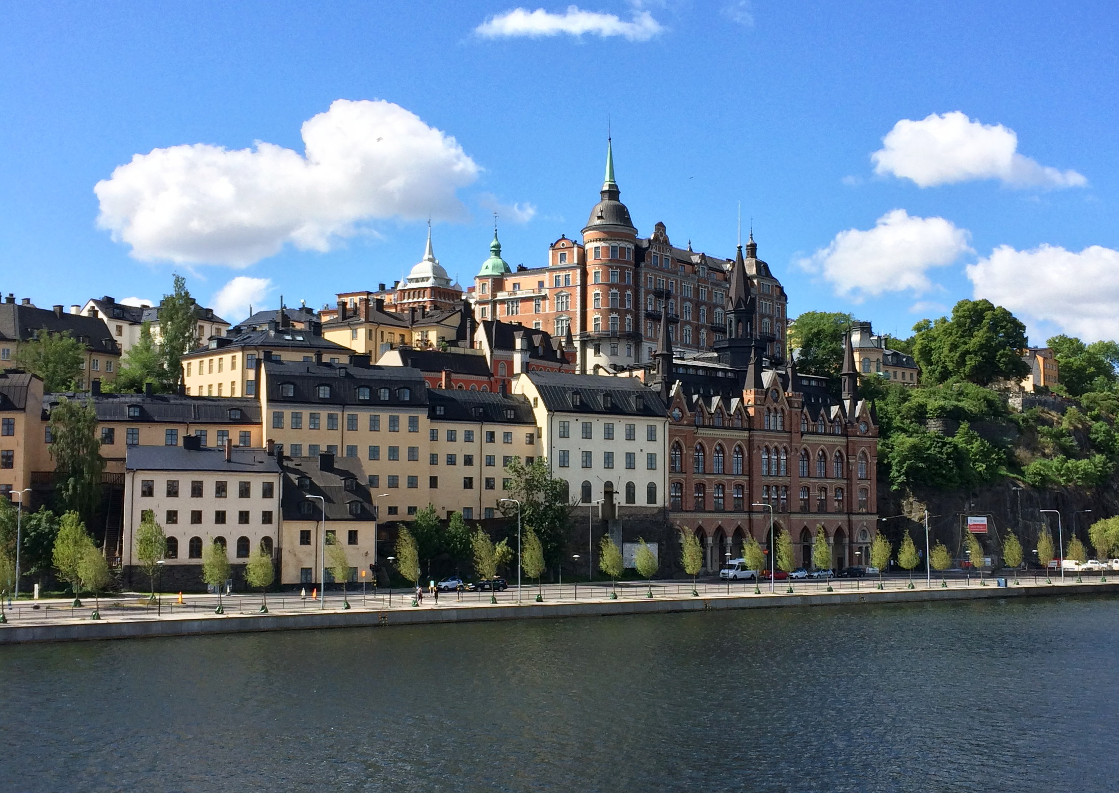 Vy över Mariaberget och kvarteret Lappskon större